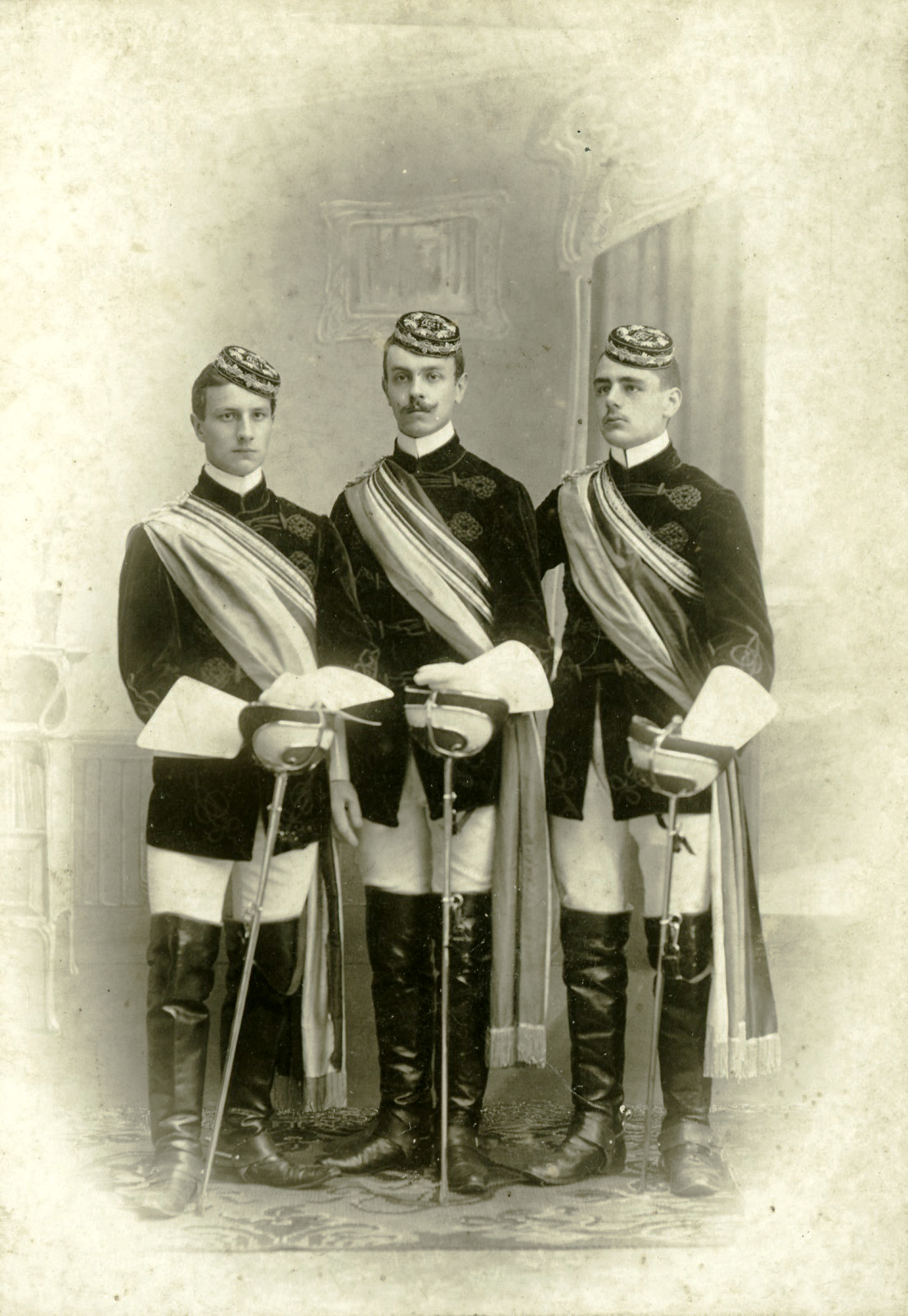 Rostocker Wingolfiten 1904: Links Karl Mützelfeldt, Mitte u. Rechts n.n.